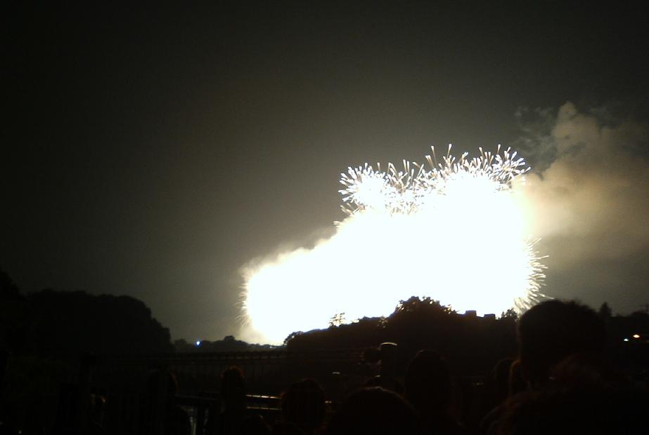 PL花火で有名なフィナーレのスターマイン